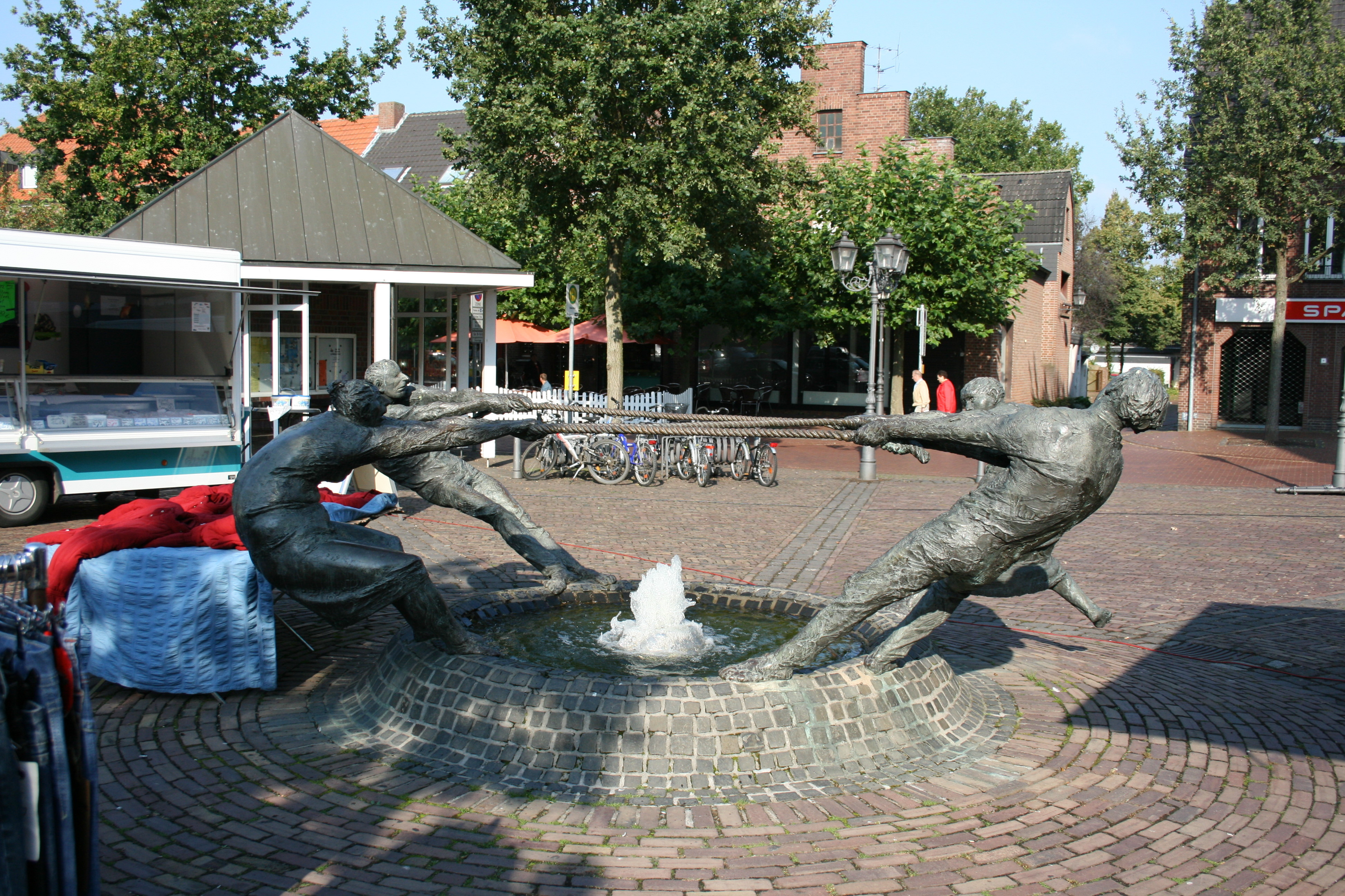 Seemannbrunnen von Karl-Henning Seemann am Markt in Uedem, aufgestellt in 1990